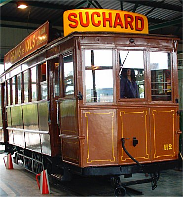 Tramway de Saint Etienne Type H tramcar at the Musée des Transports urbains de Saint Etienne.